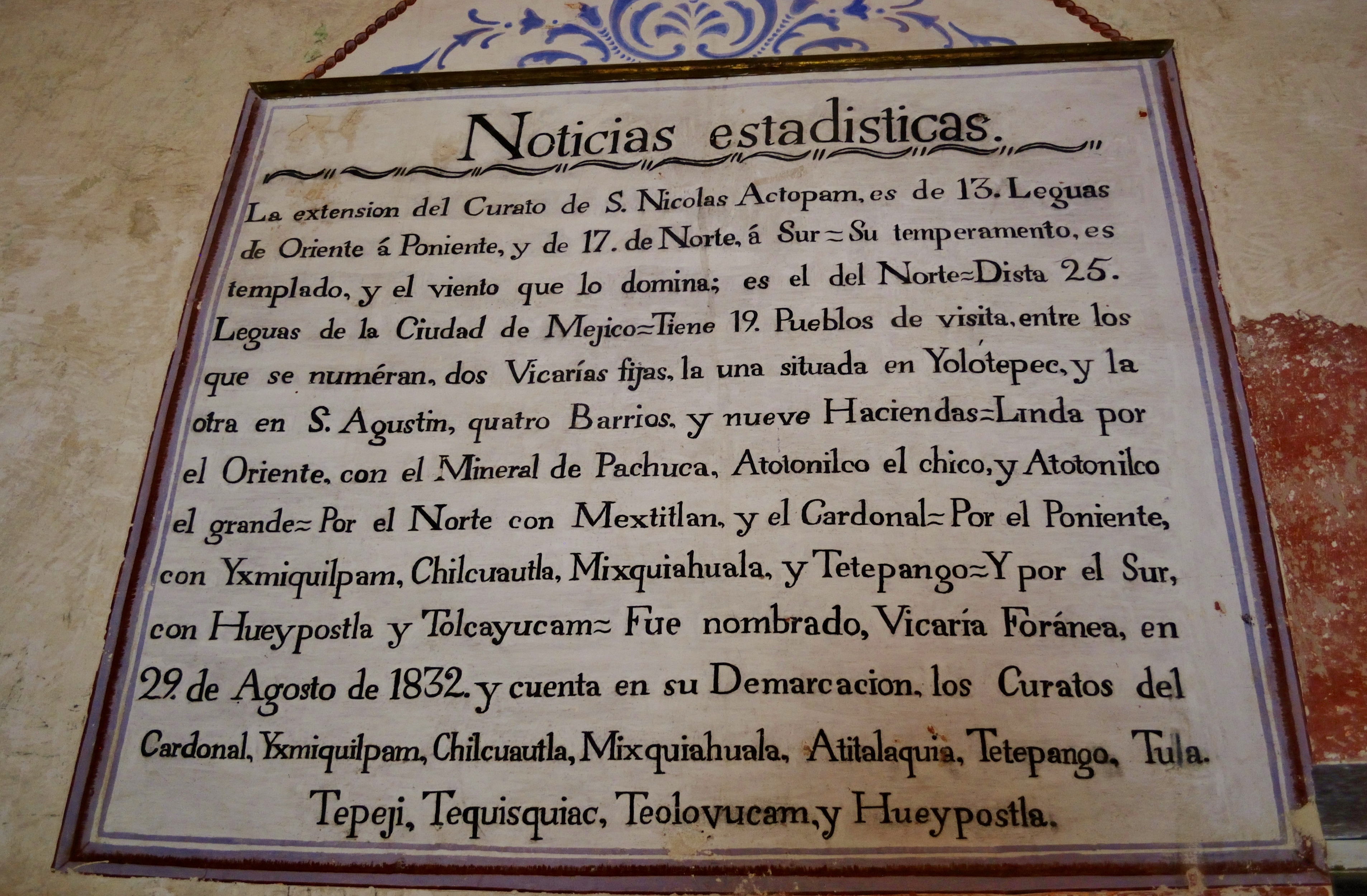 In 1933 the Temple and former Convent of San Nicolas Tolentino, located in Actopan, Hidalgo, is handed over to the Directorate of Colonial Monuments of the Republic.